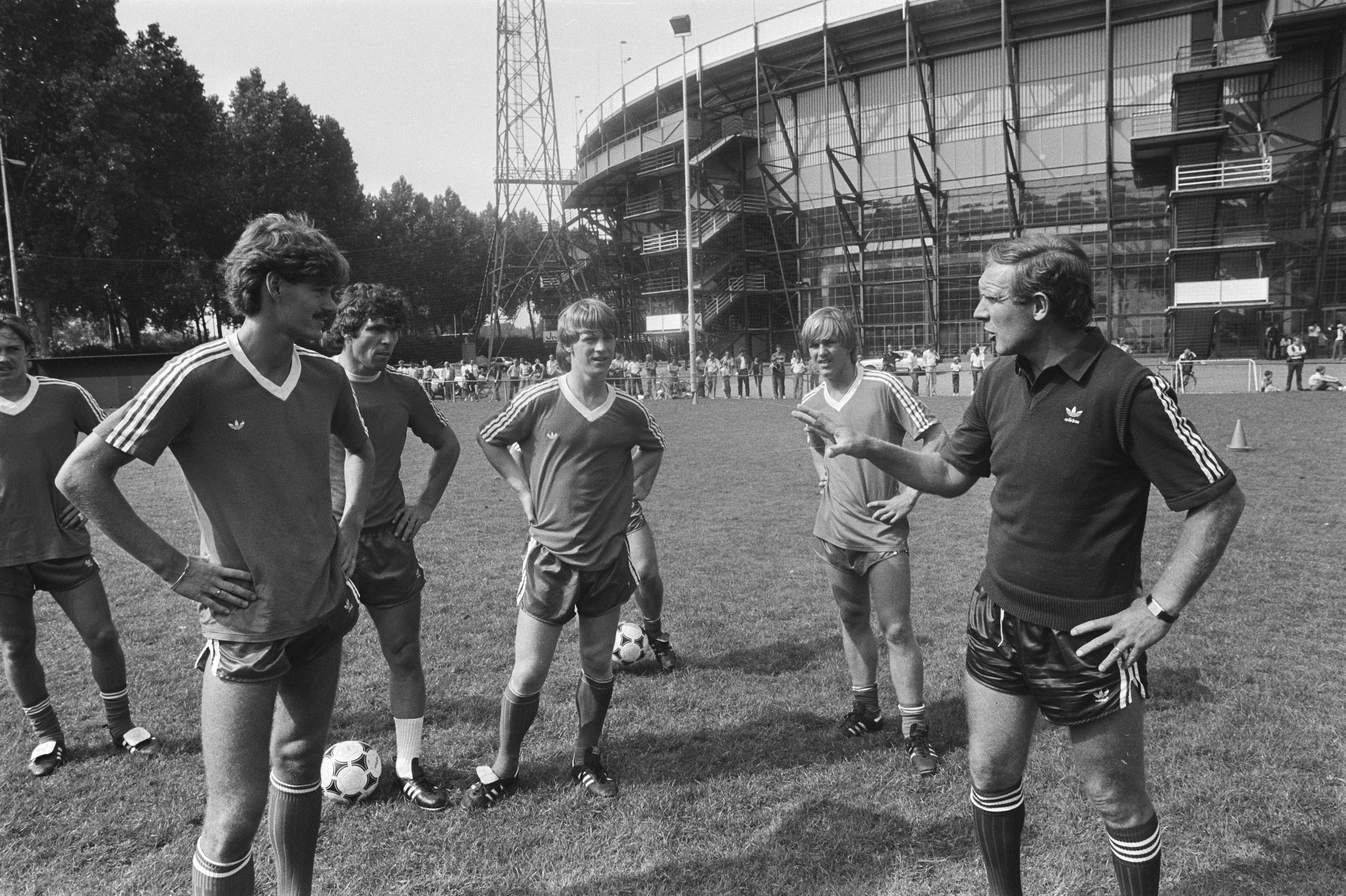 Collectie / Archief : Fotocollectie Anefo Reportage / Serie : [ onbekend ] Beschrijving : Training Feijenoord; v.l.n.r. Sjaak Troost , Willem van Hanegem , Mario Been , Johnny Jacobsen en trainer Hans Kraay Datum : 29 juli 1982 Trefwoorden : sport, trainers, voetbal Persoonsnaam : Hanegem, Willem van, Hans Kraay Instellingsnaam : Feyenoord Fotograaf : Dijk, Hans van / Anefo Auteursrechthebbende : Nationaal Archief Materiaalsoort : Negatief (zwart/wit) Nummer archiefinventaris : bekijk toegang 2.24.01.05 Bestanddeelnummer : 932-2599